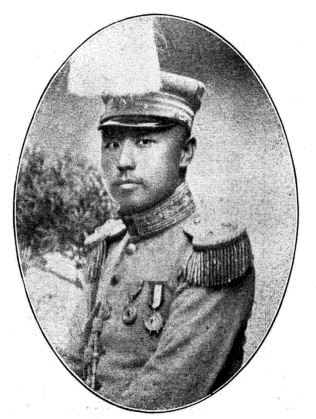 中華民國國會議員